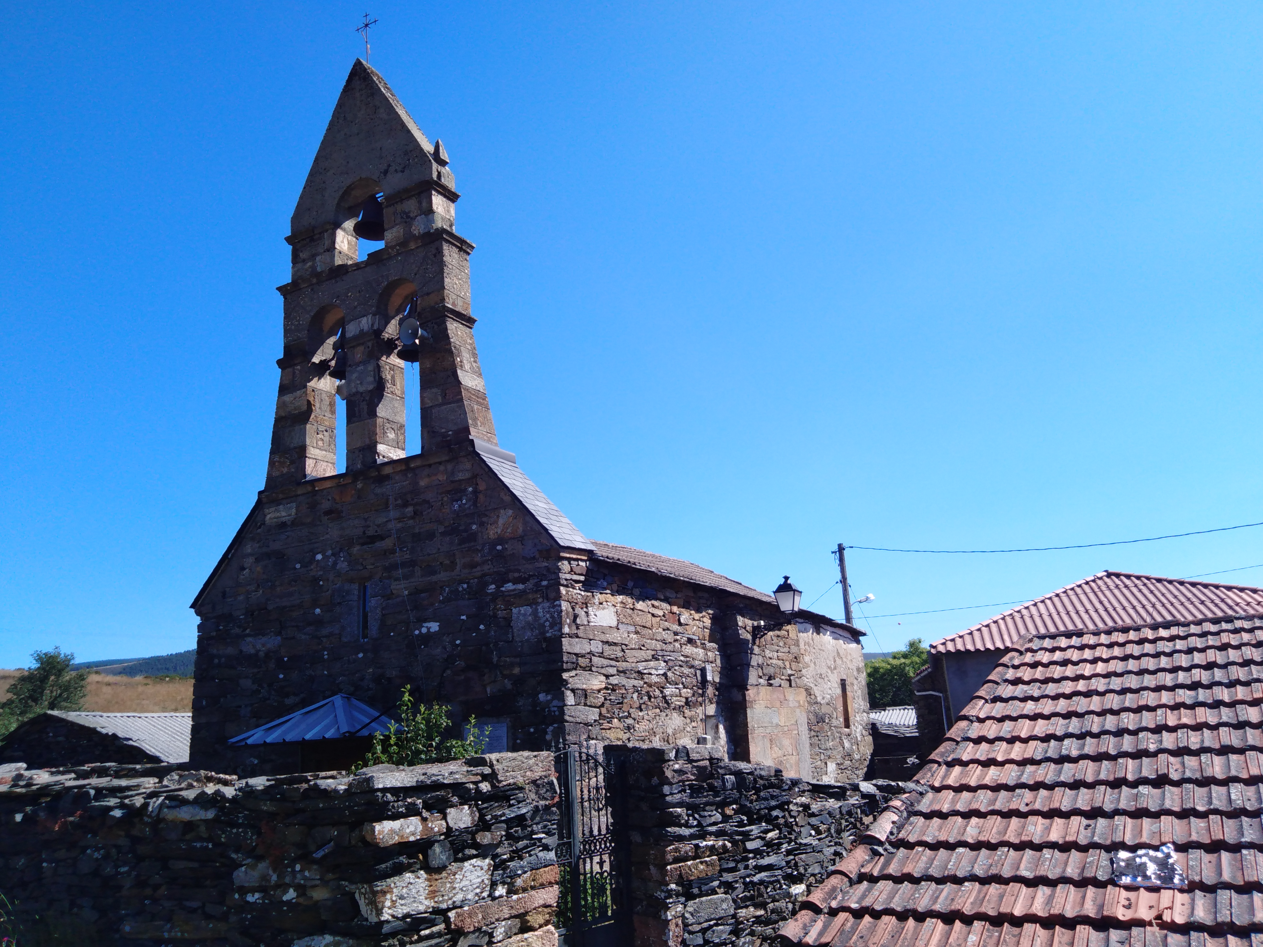 Igrexa de San Miguel de Portocamba (Castrelo do Val)